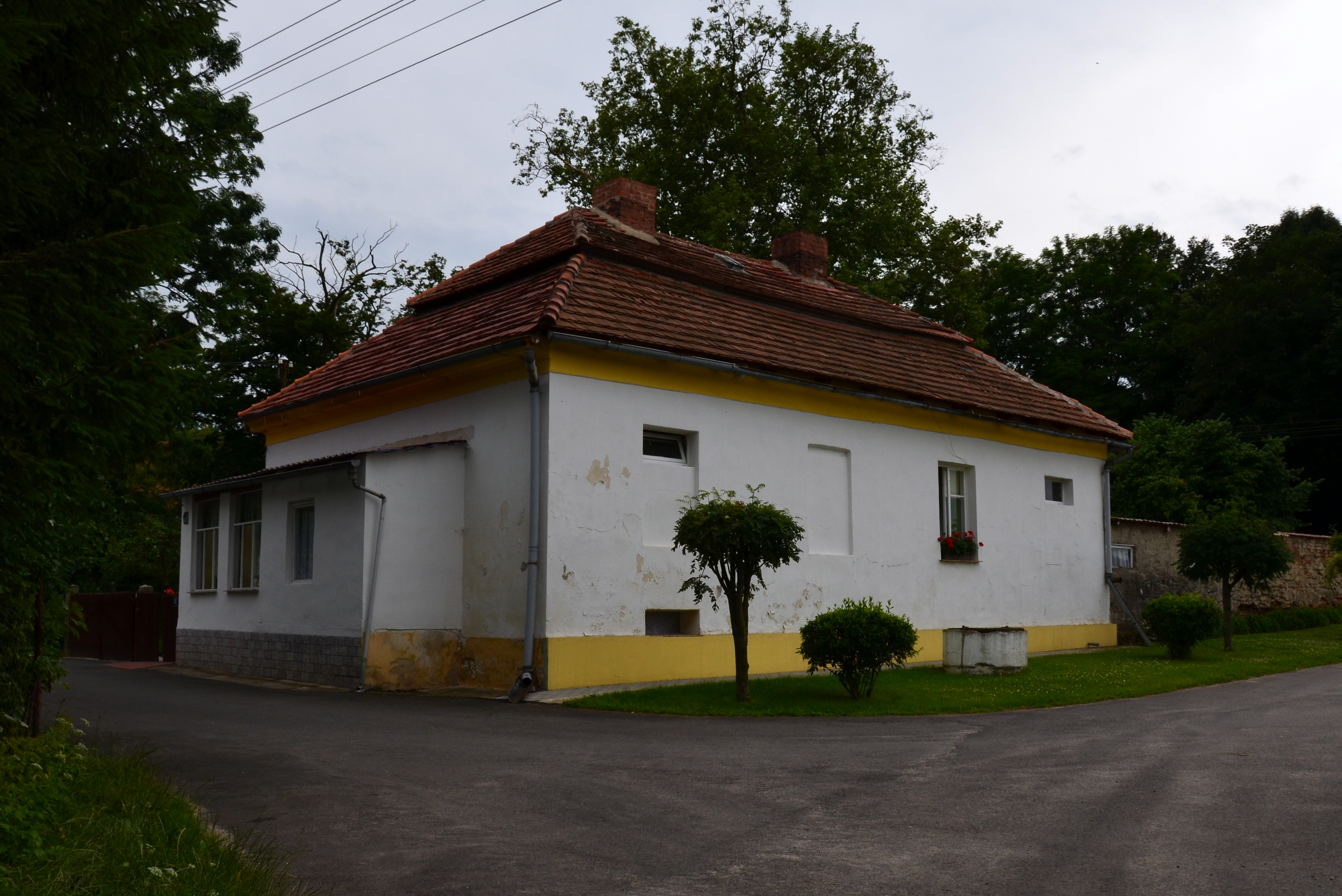 Bronów 5, dom ogrodnika (nr 5), XVIII, XIX